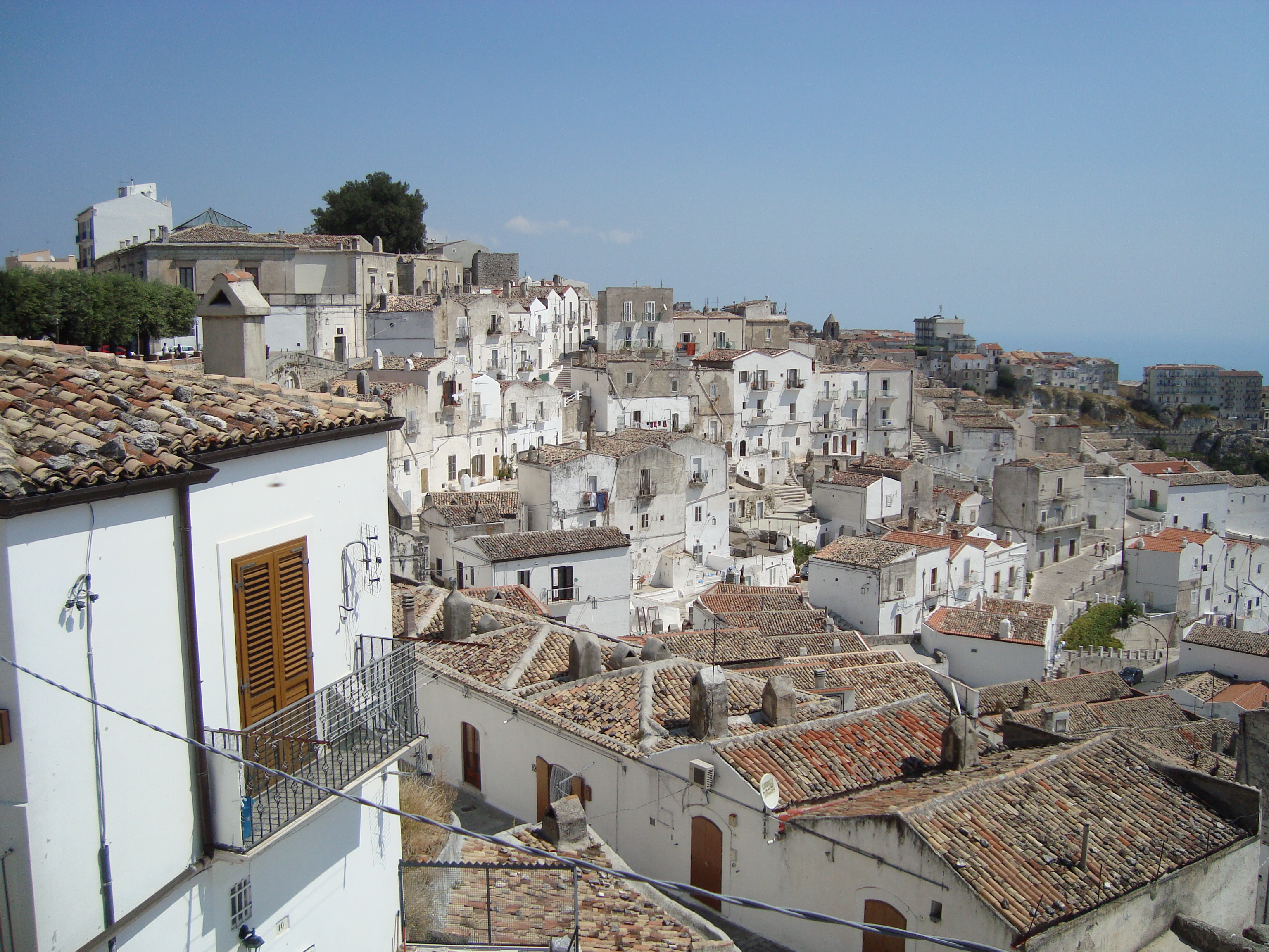 Vue générale de Monte Sant'Angelo dans les Pouilles en Italie